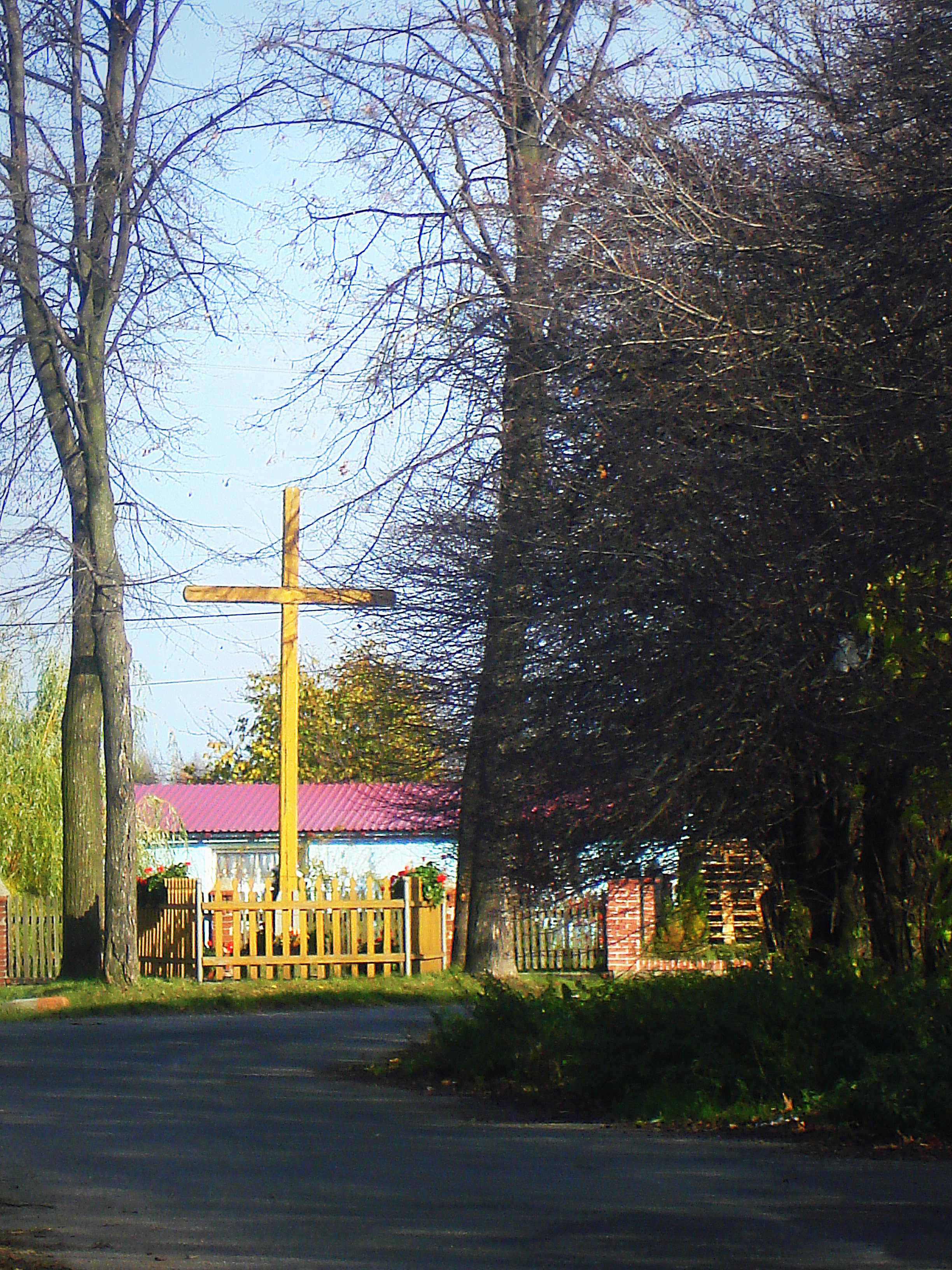 Pasieczna, przydrożny krzyż